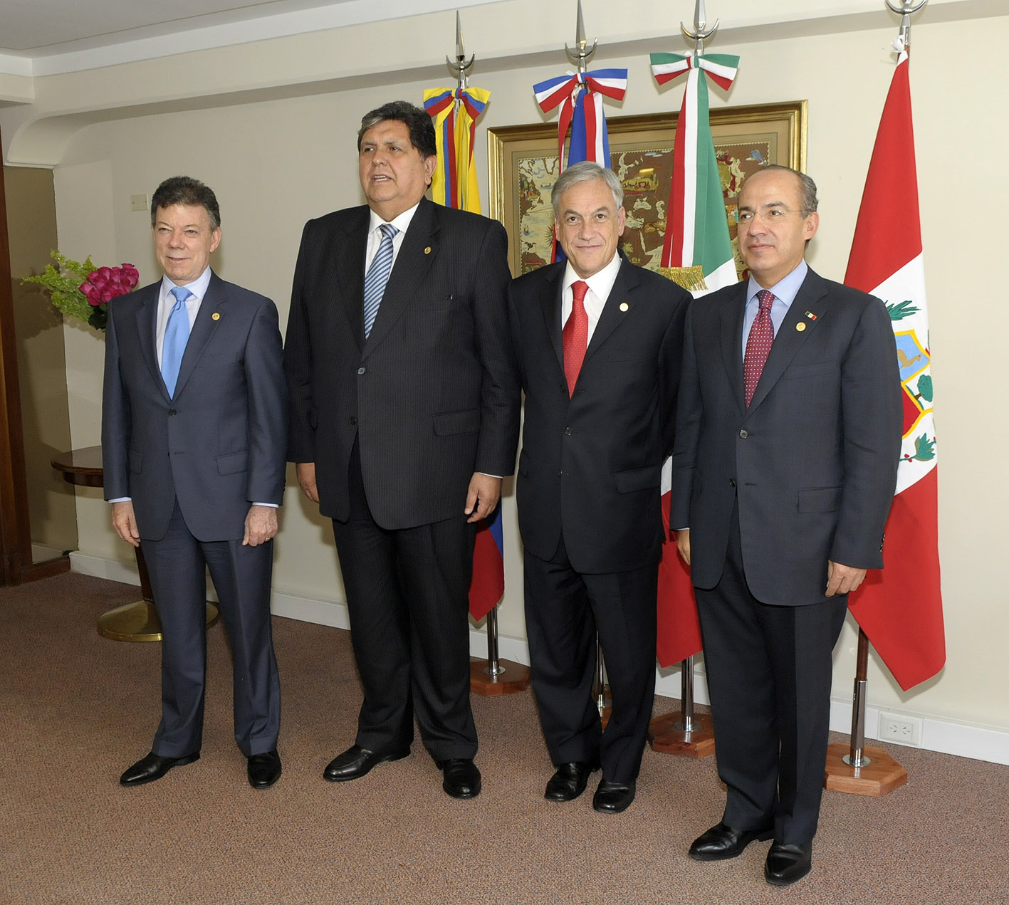 Mandatario chileno participa de cita presidencial con Colombia, México y Perú.